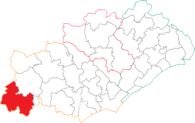 Situation du canton dans le département de l'Hérault.